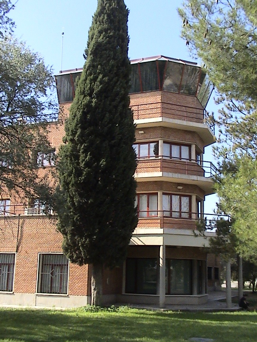 Antigua torre de control del Aeródromo de Barberán y Collar de Alcalá de Henares (Comunidad de Madrid - España) construida en 1943. Actualmente es el edificio de los Servicios Informáticos de la Universidad de Alcalá.